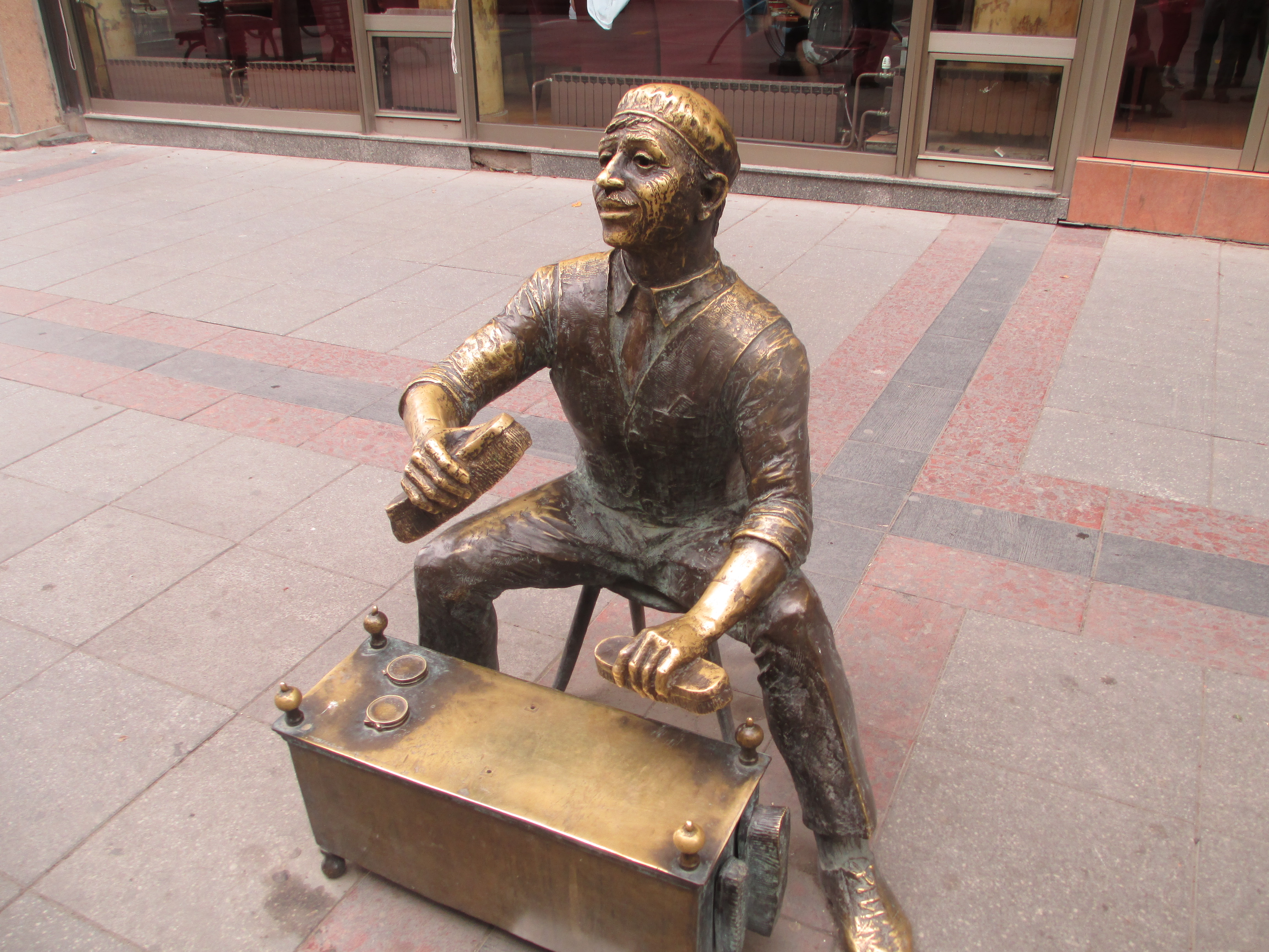 פסל מצחצח נעליים בסקופיה